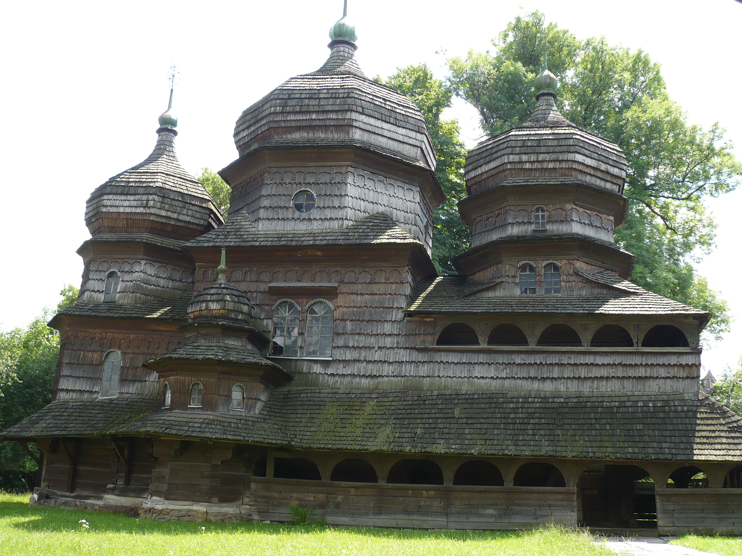 Cerkiew pw. św. Jura